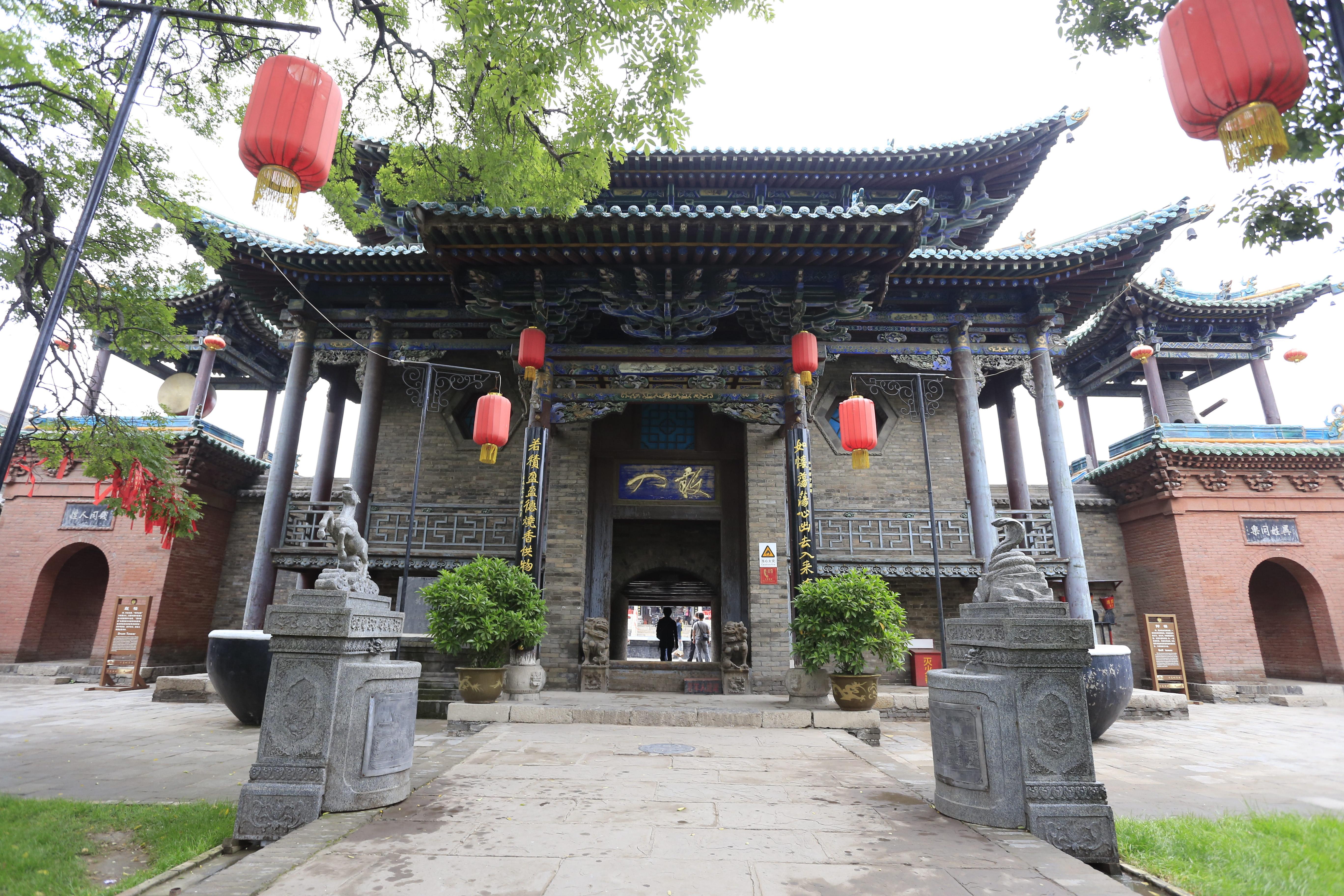 平遥城隍庙 —— 前殿